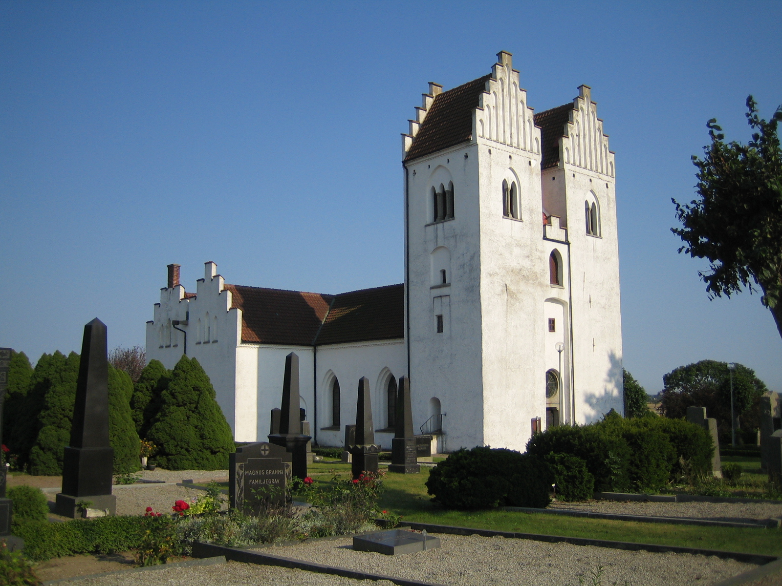 Hörups kyrka